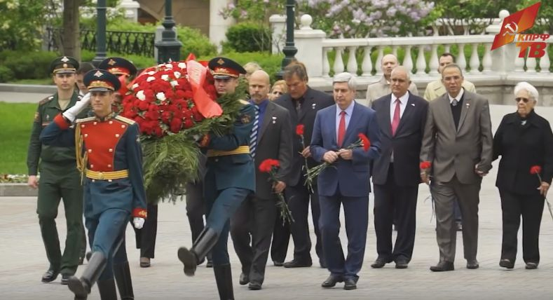 Первый заместитель председателя ЦК КПРФ И.И. Мельников и делегация кубинских героев возложили цветы к Могиле неизвестного солдата у Кремлевской стены и Мавзолею В.И. Ленина.